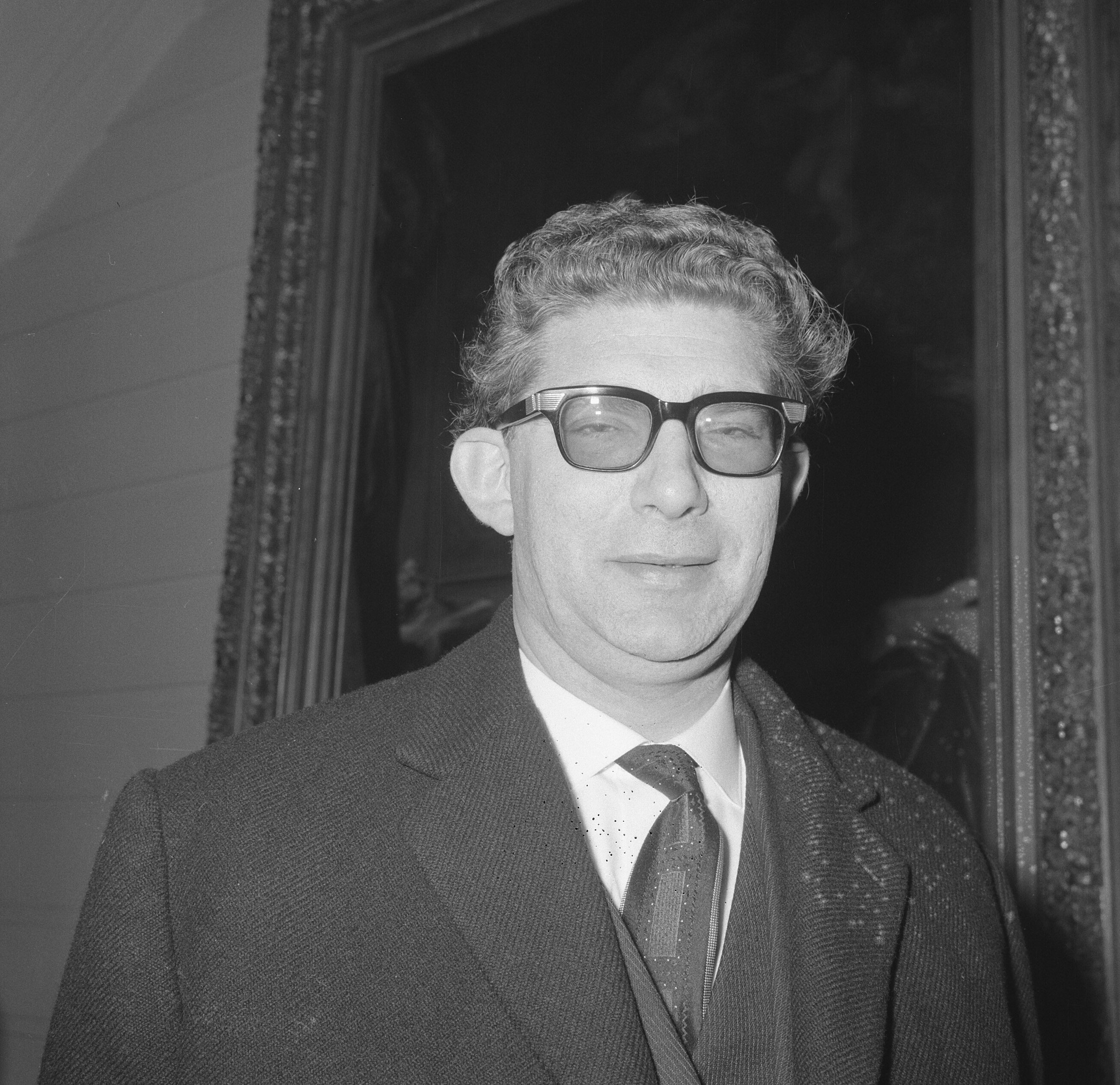 Collectie / Archief : Fotocollectie Anefo Reportage / Serie : [ onbekend ] Beschrijving : Ministers Belgische Kabinet. Vice Eerste Minister W. de Clerq (PVV) Datum : 22 maart 1966 Locatie : België Trefwoorden : kabinetten, ministers, politiek, portretten Persoonsnaam : Clerq W de Fotograaf : Nijs, Jac. de / Anefo Auteursrechthebbende : Nationaal Archief Materiaalsoort : Negatief (zwart/wit) Nummer archiefinventaris : bekijk toegang 2.24.01.03 Bestanddeelnummer : 918-9461